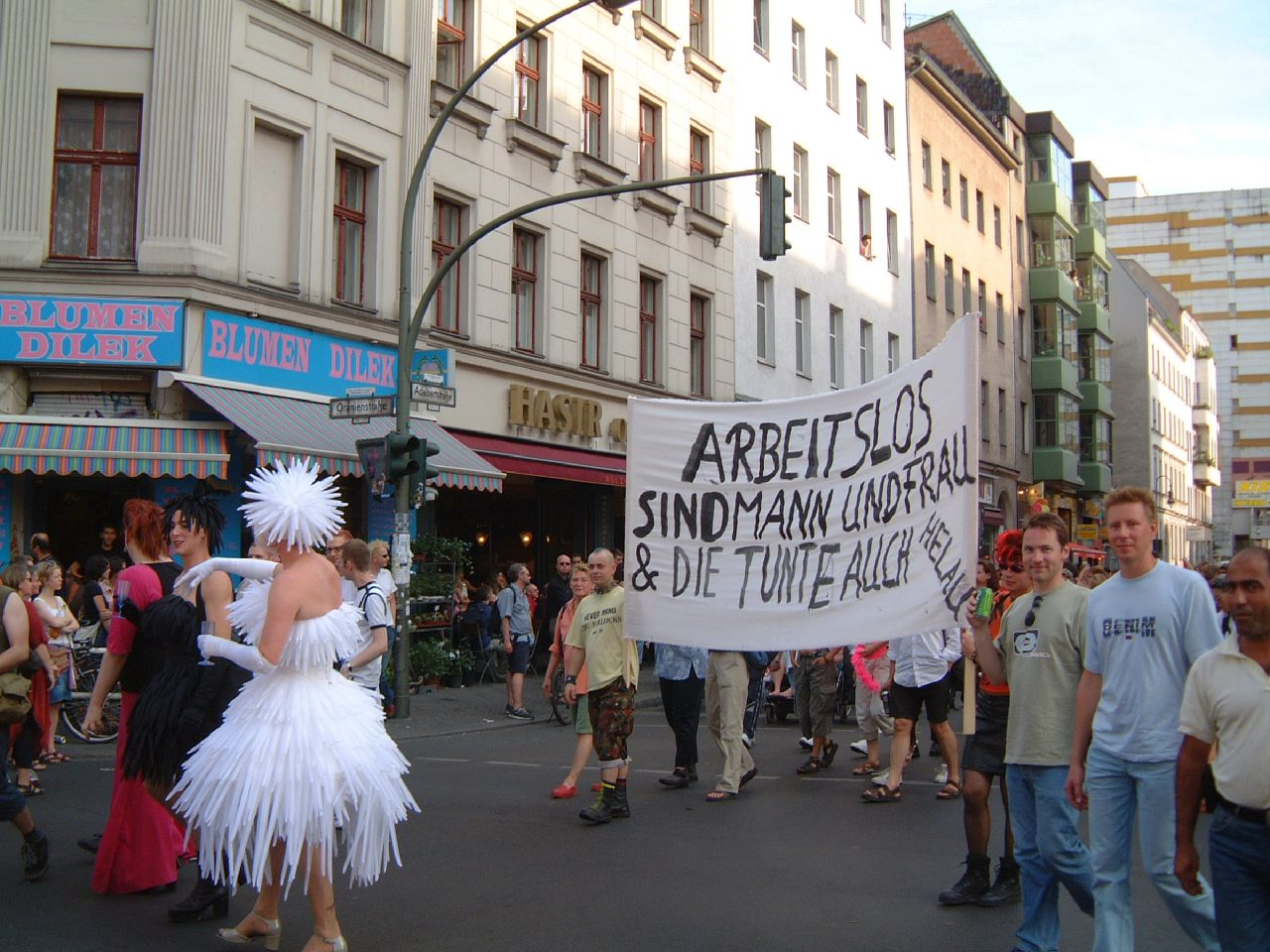 Transgenialer CSD, 2003 in Berlin